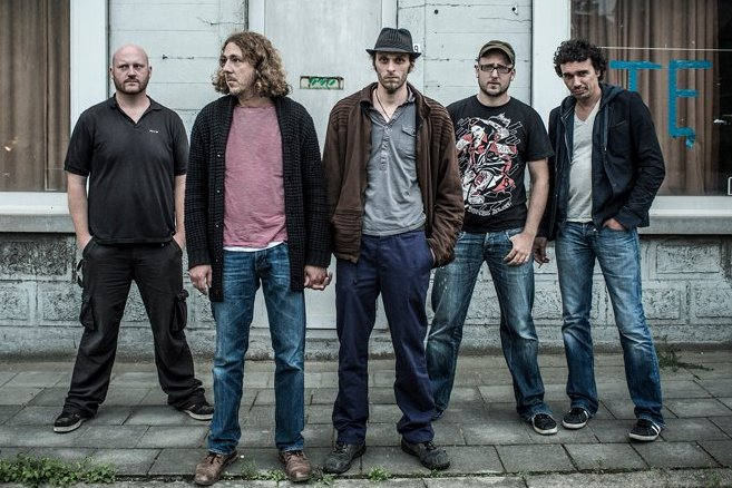 Foto uit fotosessie van Preuteleute